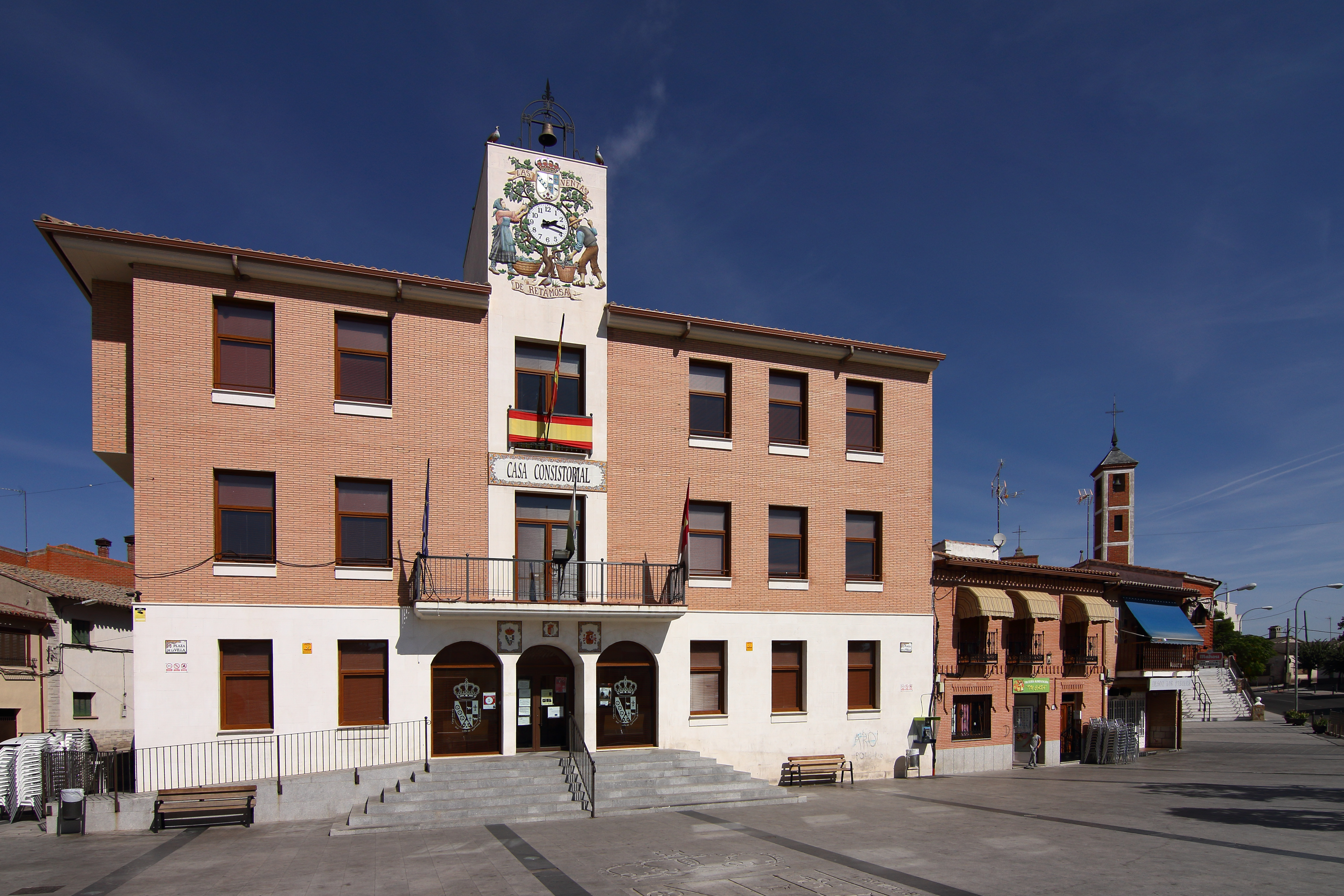 Ayuntamiento de Las Ventas de Retamosa